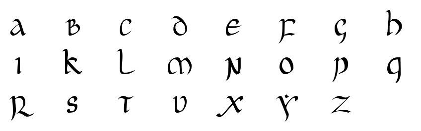 Alphabet latin dans sa variante onciale. Vincent Ramos